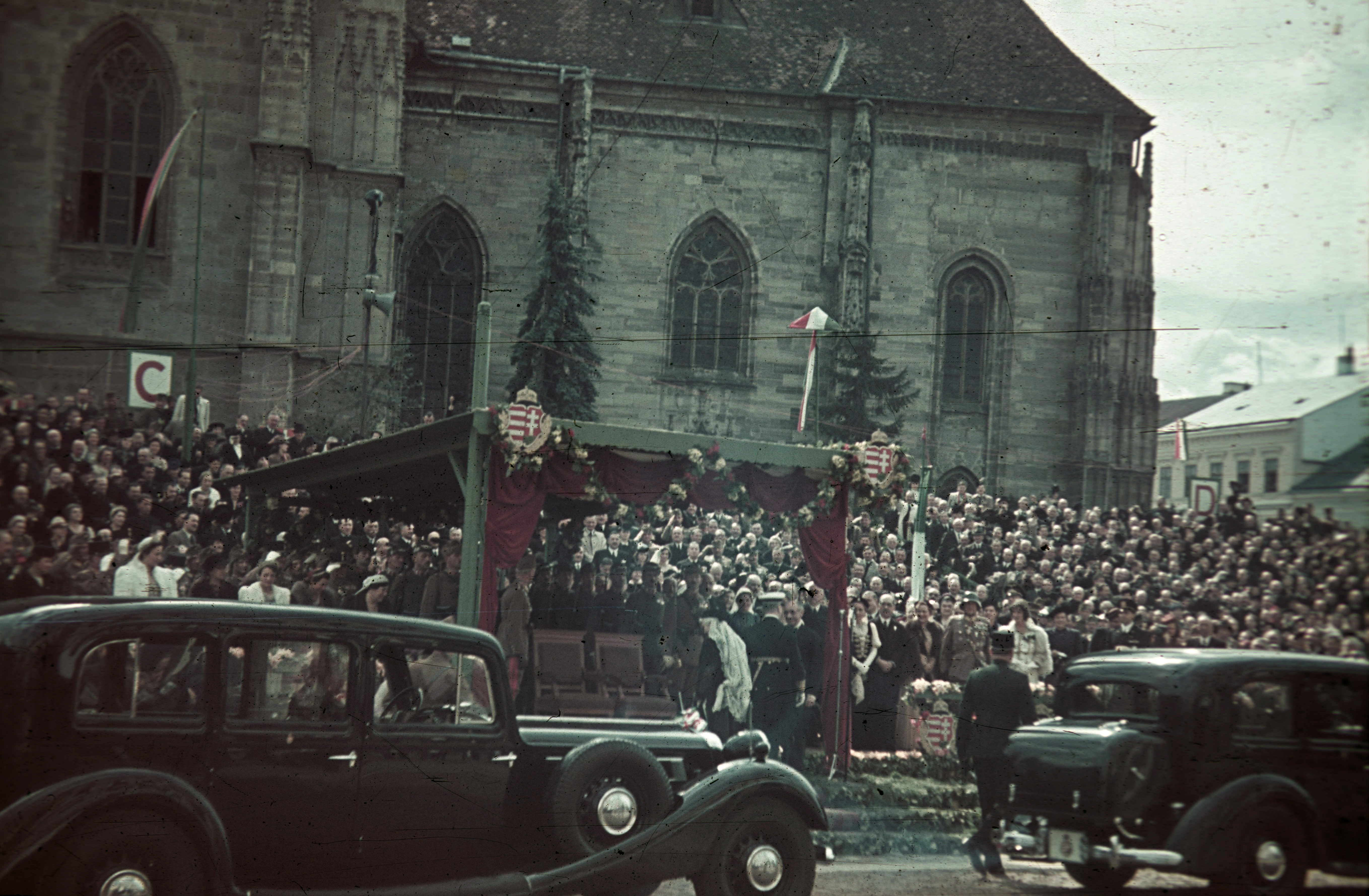 Fő tér a magyar csapatok bevonulása idején, a Szent Mihály-templom előtti emelvénynél Horthy Miklós. A felvétel 1940. szeptember 11-én készült. Location: Romania, Transylvania, Cluj-Napoca Tags: territorial gain, national emblem, colorful Title: Fő tér a magyar csapatok bevonulása idején, a Szent Mihály-templom előtti emelvénynél Horthy Miklós. A felvétel 1940. szeptember 11-én készült.